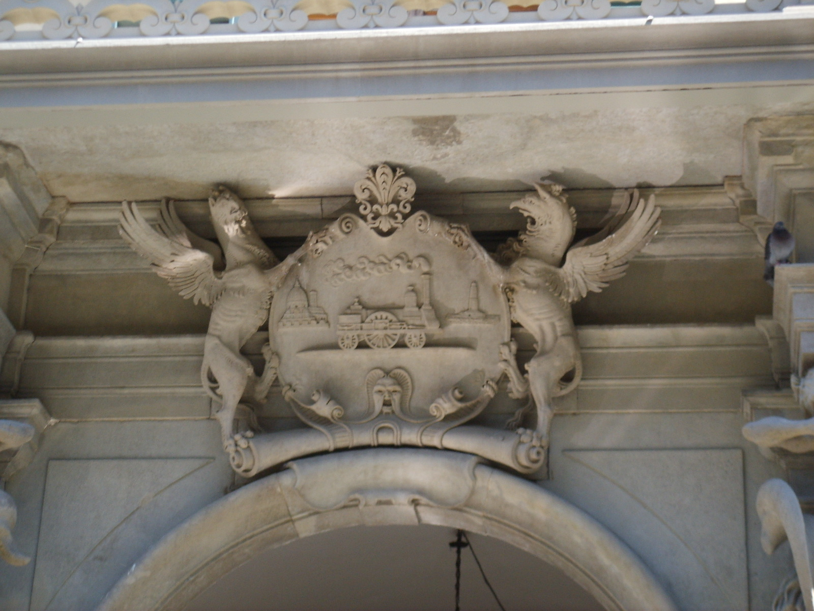 Palazzo di Via San Gallo, symbol, Florence, Italy